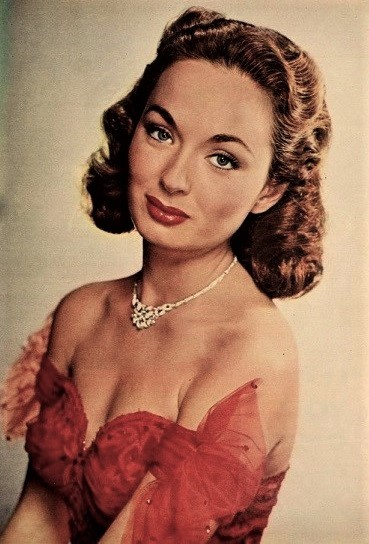 Ann Blyth